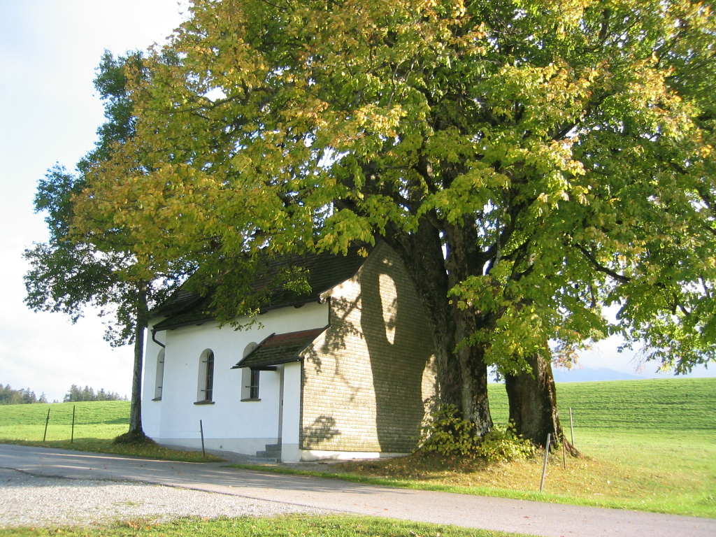 Kapelle St. Rasso in Schweinegg, Gde. Eisenberg, Landkreis Ostallgäu